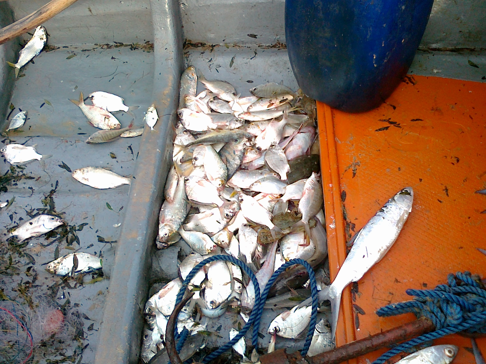 மீன்கள்